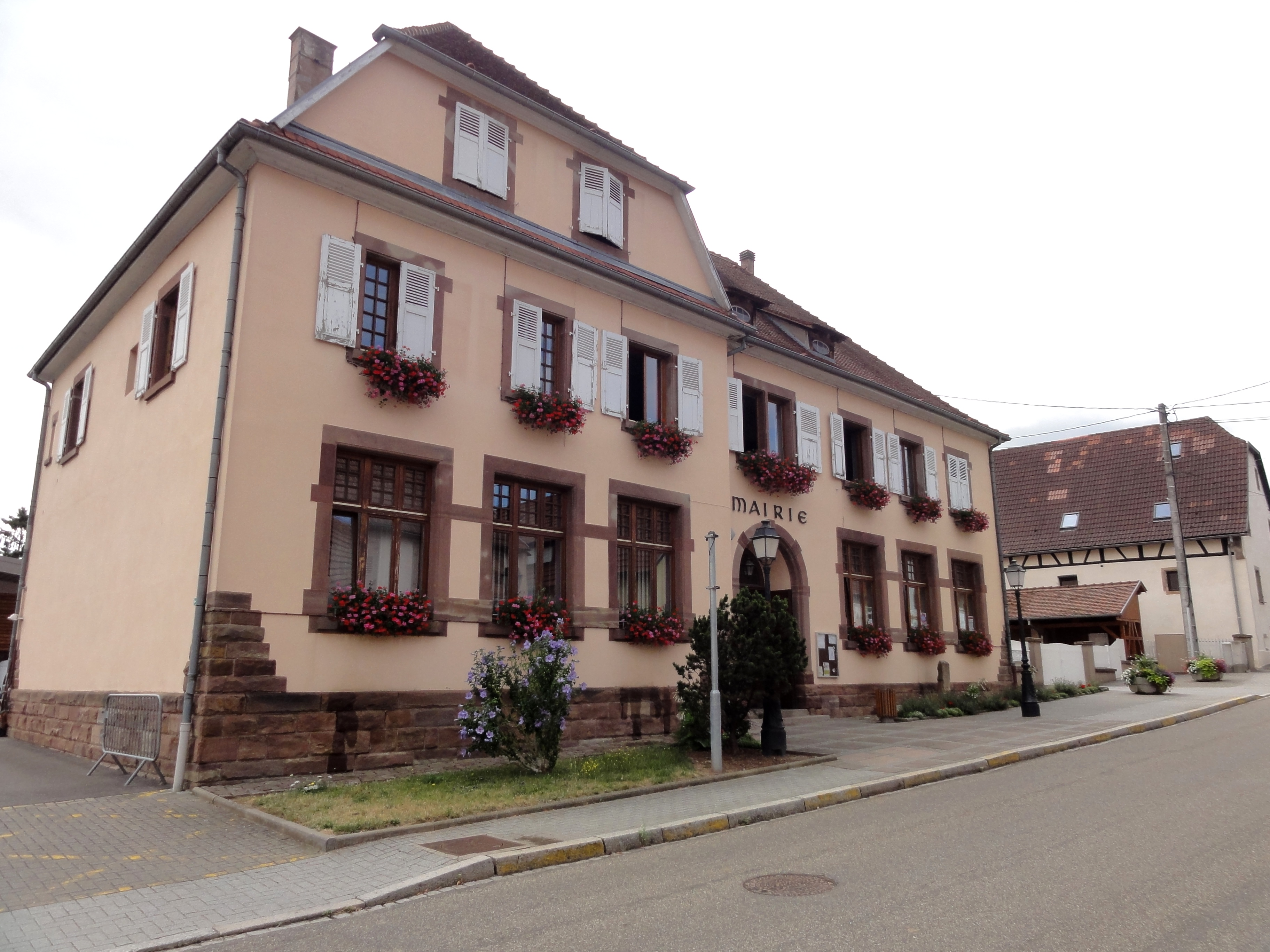 Alsace, Bas-Rhin, Dahlenheim, Mairie, 2 rue du Lavoir.